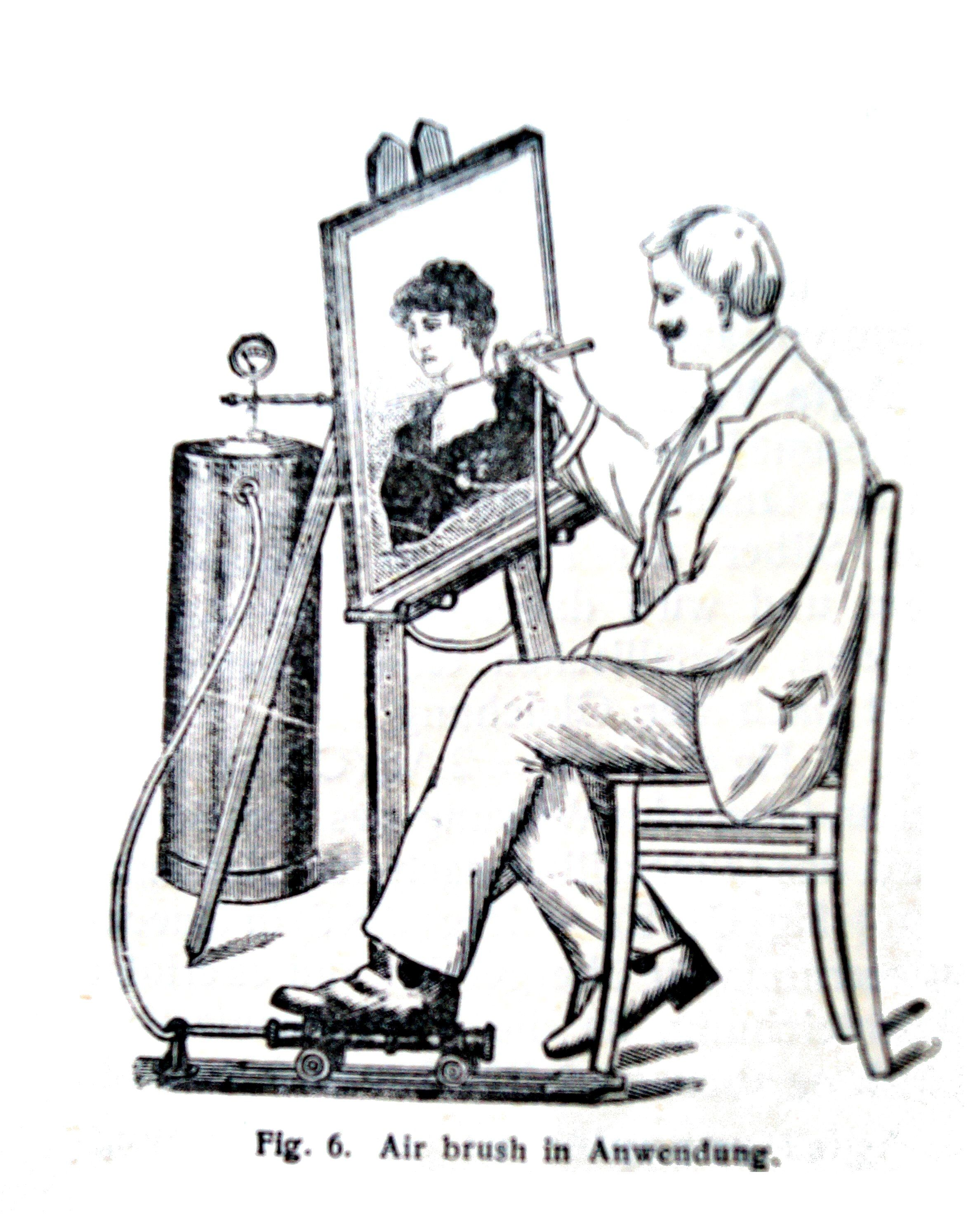 Darstellung einer historischen Airbrushmaschine um 1900.Lienks unten fußbetribene Luftpumpe für den Luftbehälter.